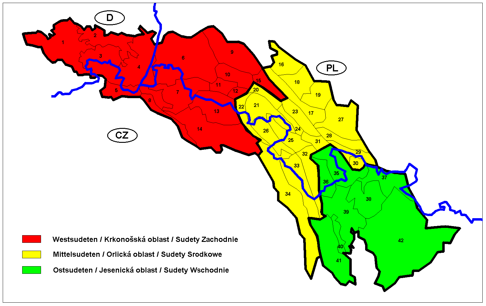 Sudety